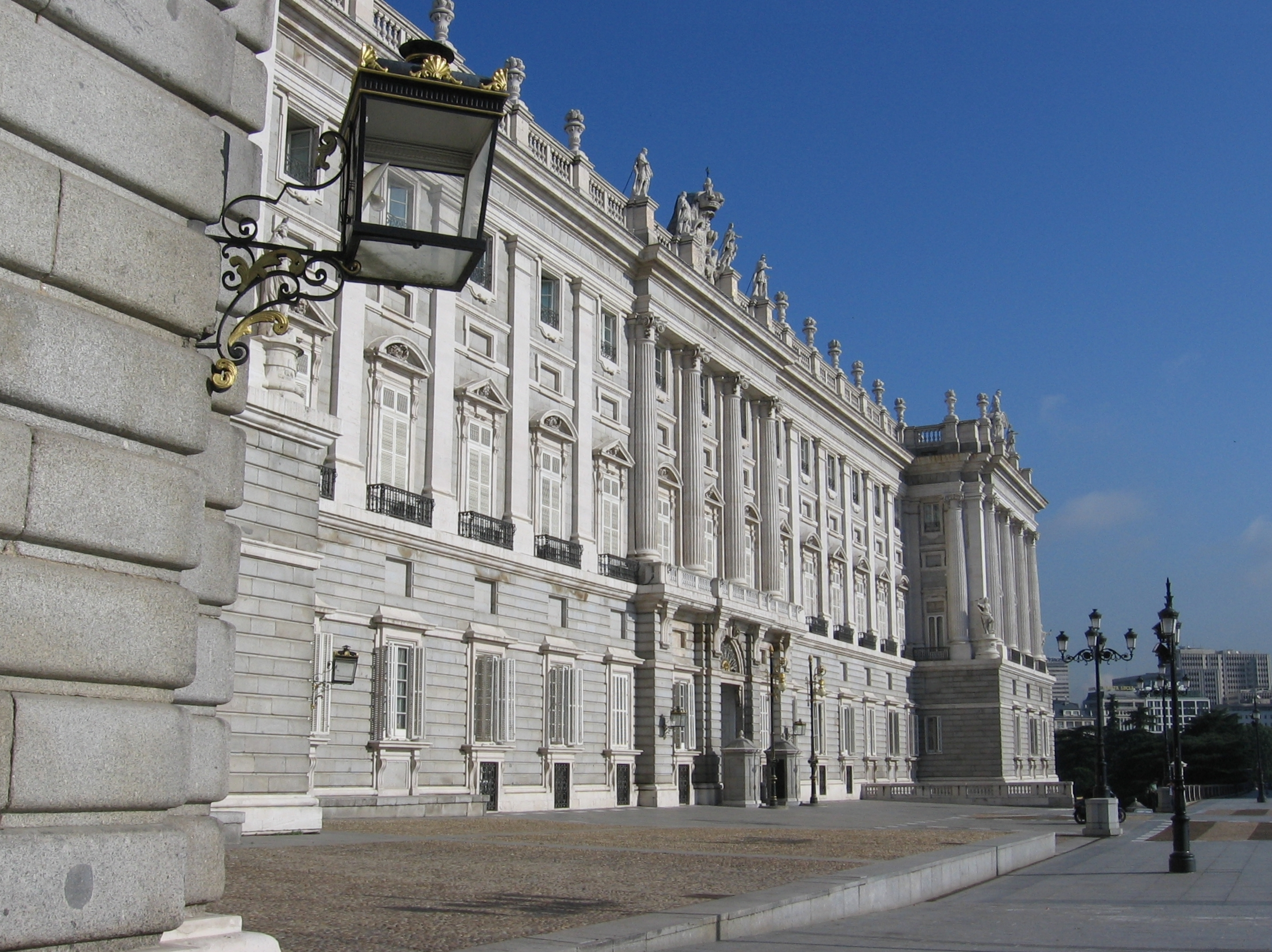 Palacio Real de Madrid